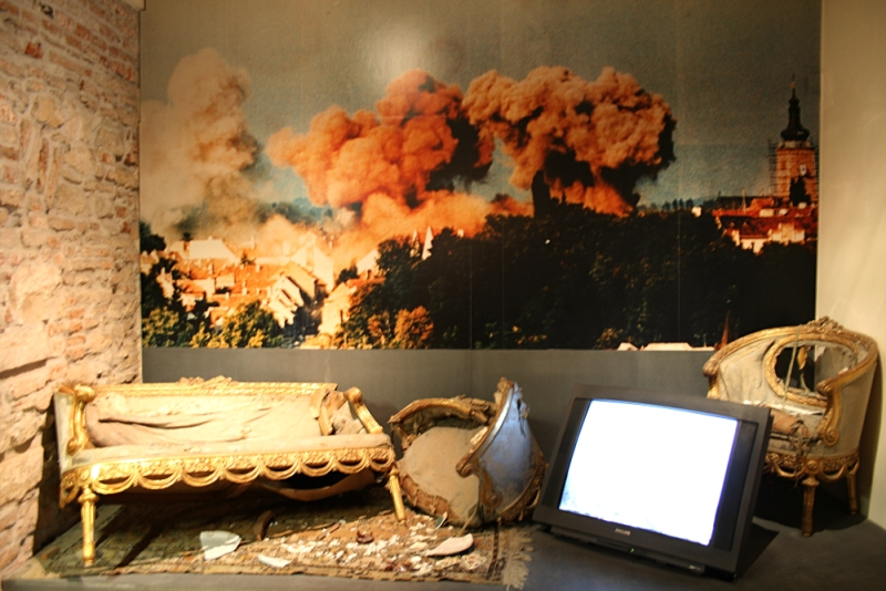 Stilski namještaj i oprema Banskih dvora uništeni u raketiranju. Dana 7. listopada 1991. godine u 15 sati i 10 minuta zrakoplovi JNA raketirali su Gornji grad. U pozadini je fotografija Hrvoja Kneza. Muzej grada Zagreba